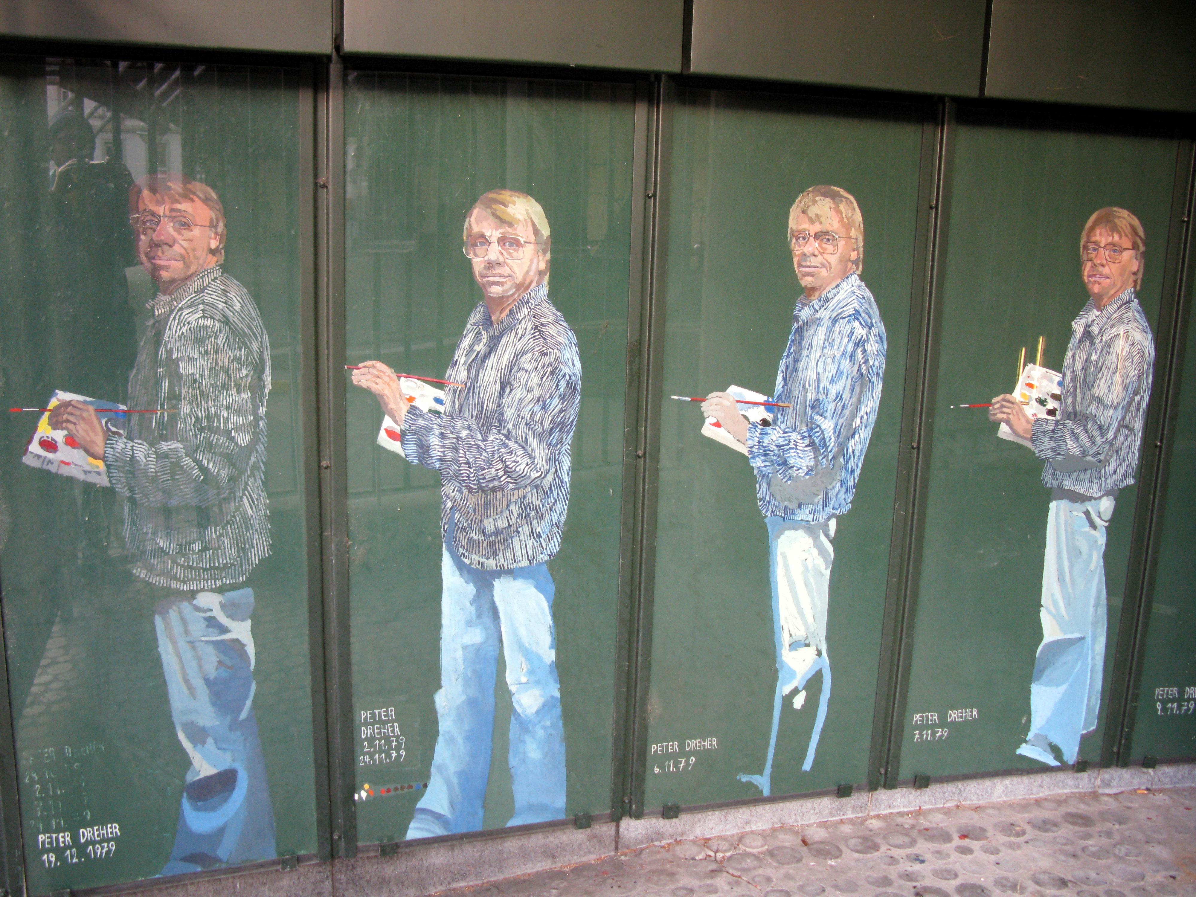 Universitätsbibliothek Freiburg, Außenfassade des Baues von 1978 mit Selbstbildnissen von Peter Dreher